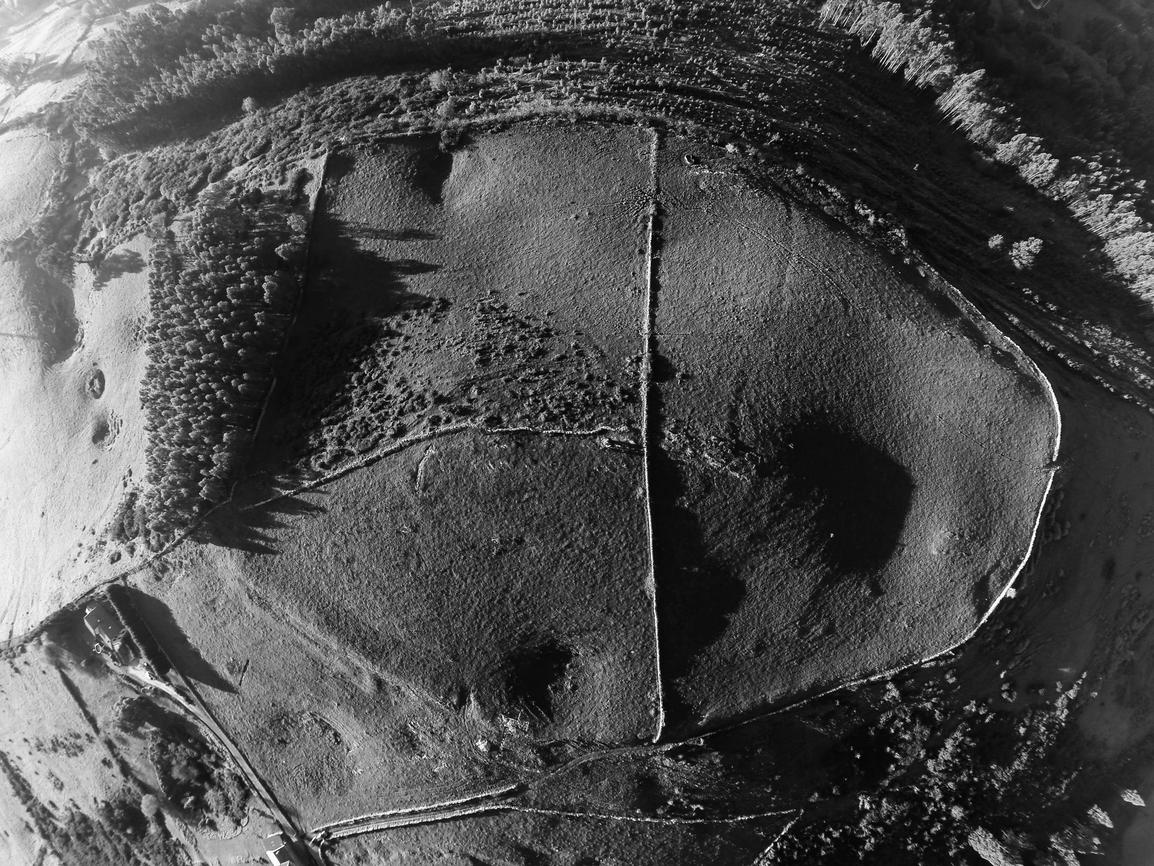 Fotografía aérea de la totalidad del enclave fortificado